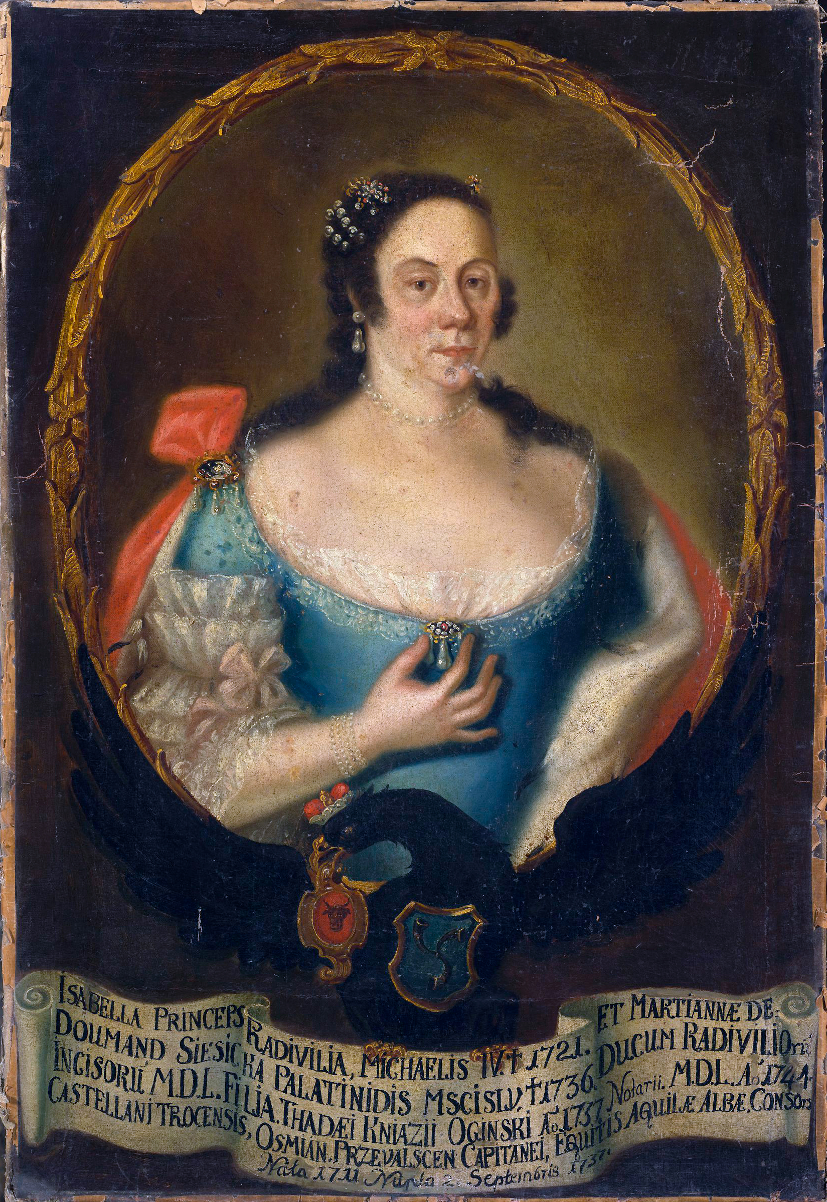 Беларуская (тарашкевіца): Партрэт Ізабэлы Агінскай (Izabeła Aginskaja) з князёў Радзівілаў (Radzivił)